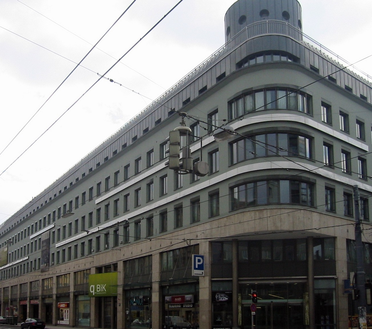 Wien, Rennweg 46-50